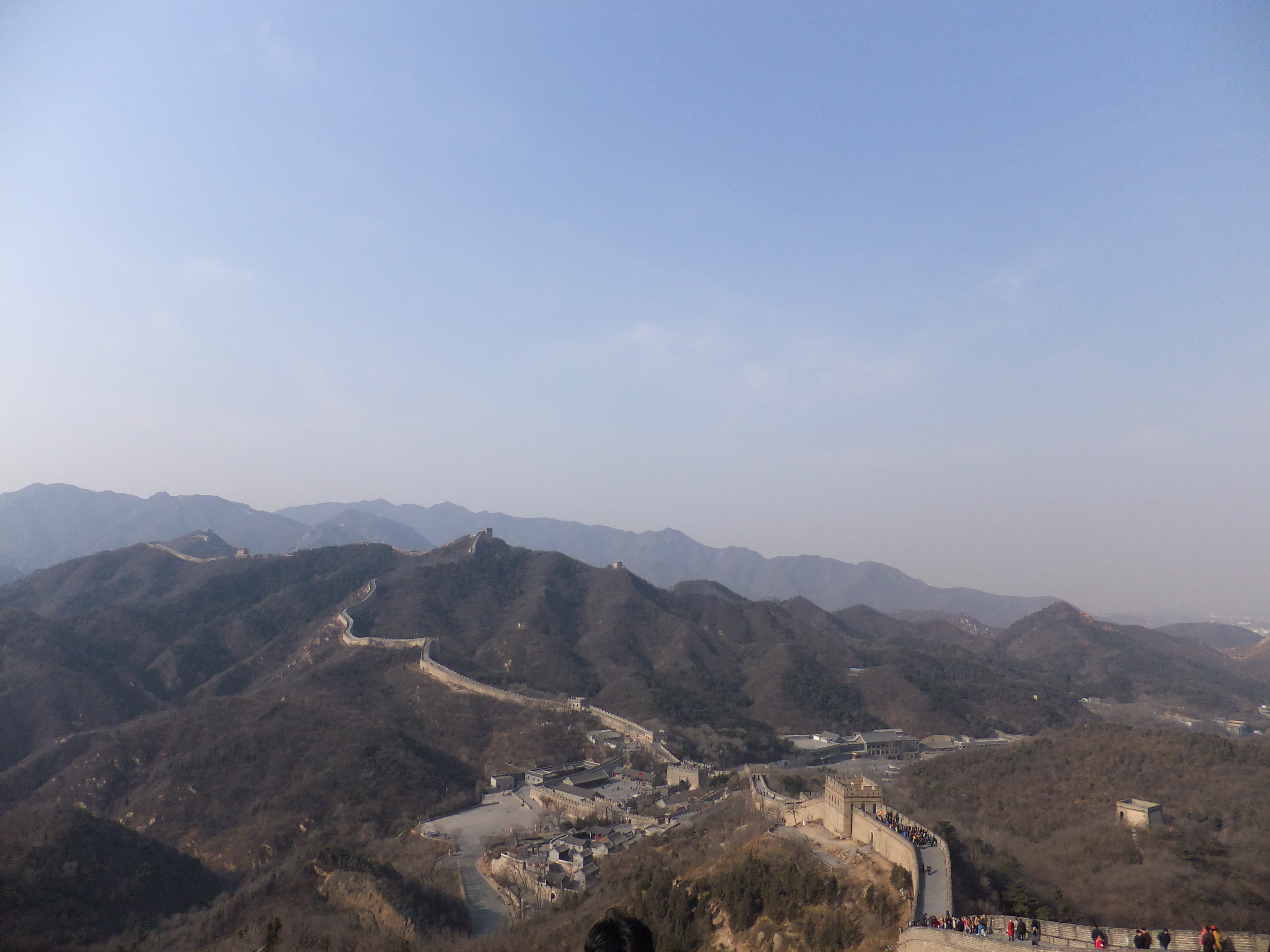 万里の長城八達嶺長城